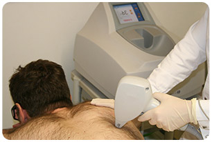 Лазерна епіляція - видалення волося назавжди (Центр лазерной эпиляции «ЛазерЛеди»)